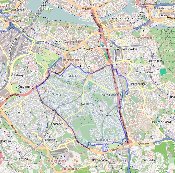 Karta från Openstreetmap över omfattningen av postorten Enskede This map may be incomplete, and may contain errors. Don't rely solely on it for navigation.